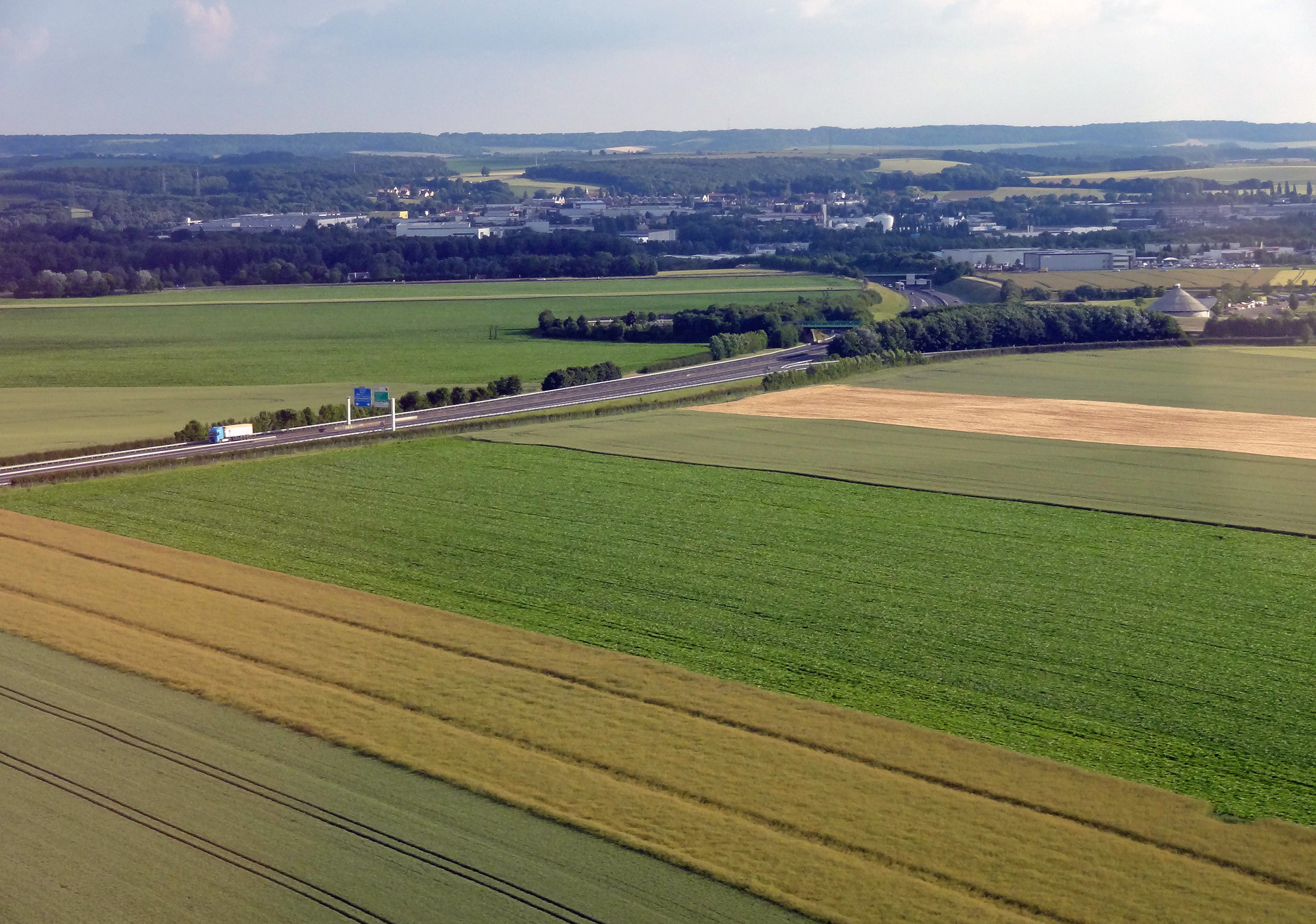 Vue aérienne de l'autoroute A16 à Therdonne (Oise), France.